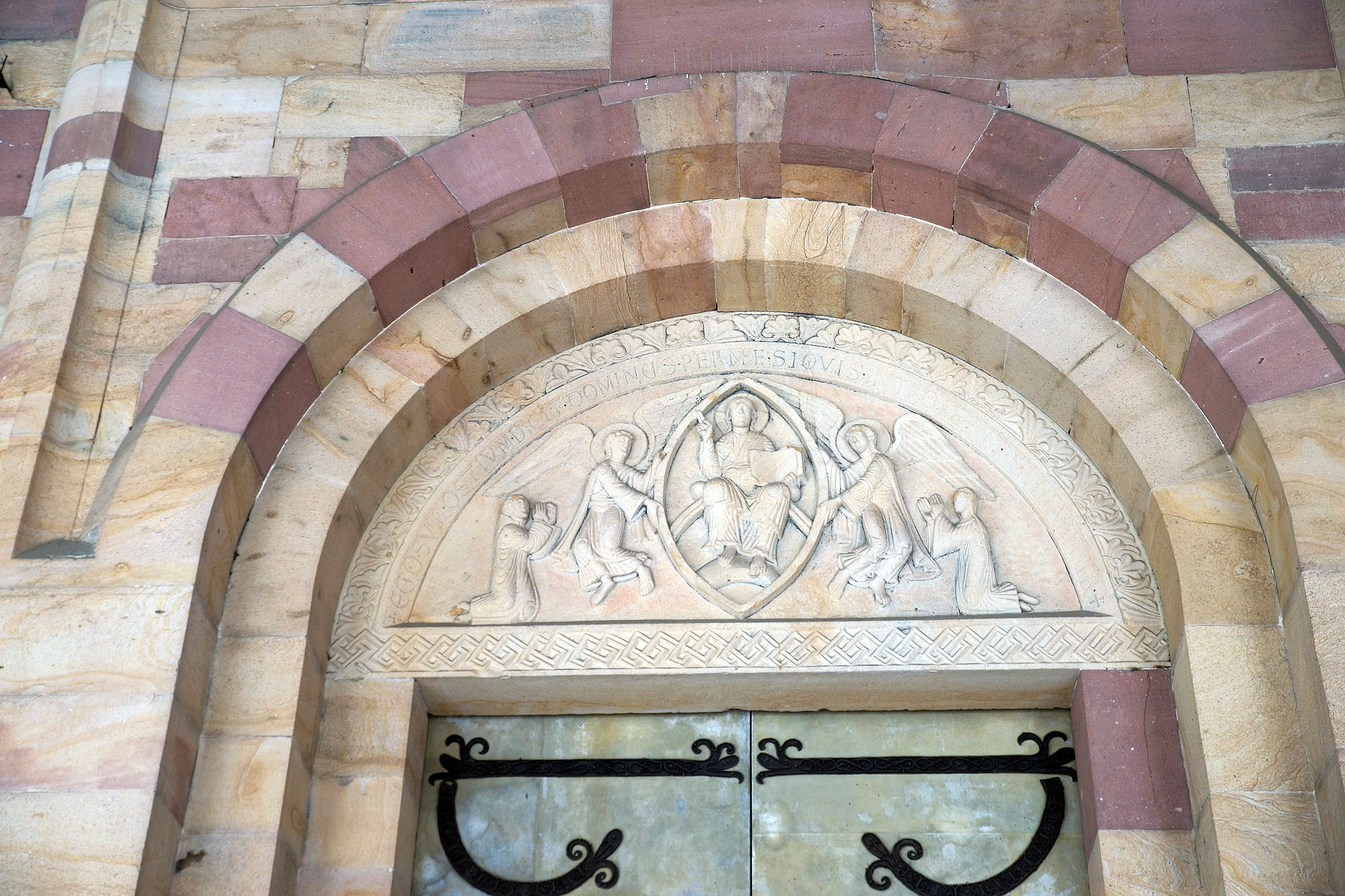 ALPIRSBACH: KLOSTER: und